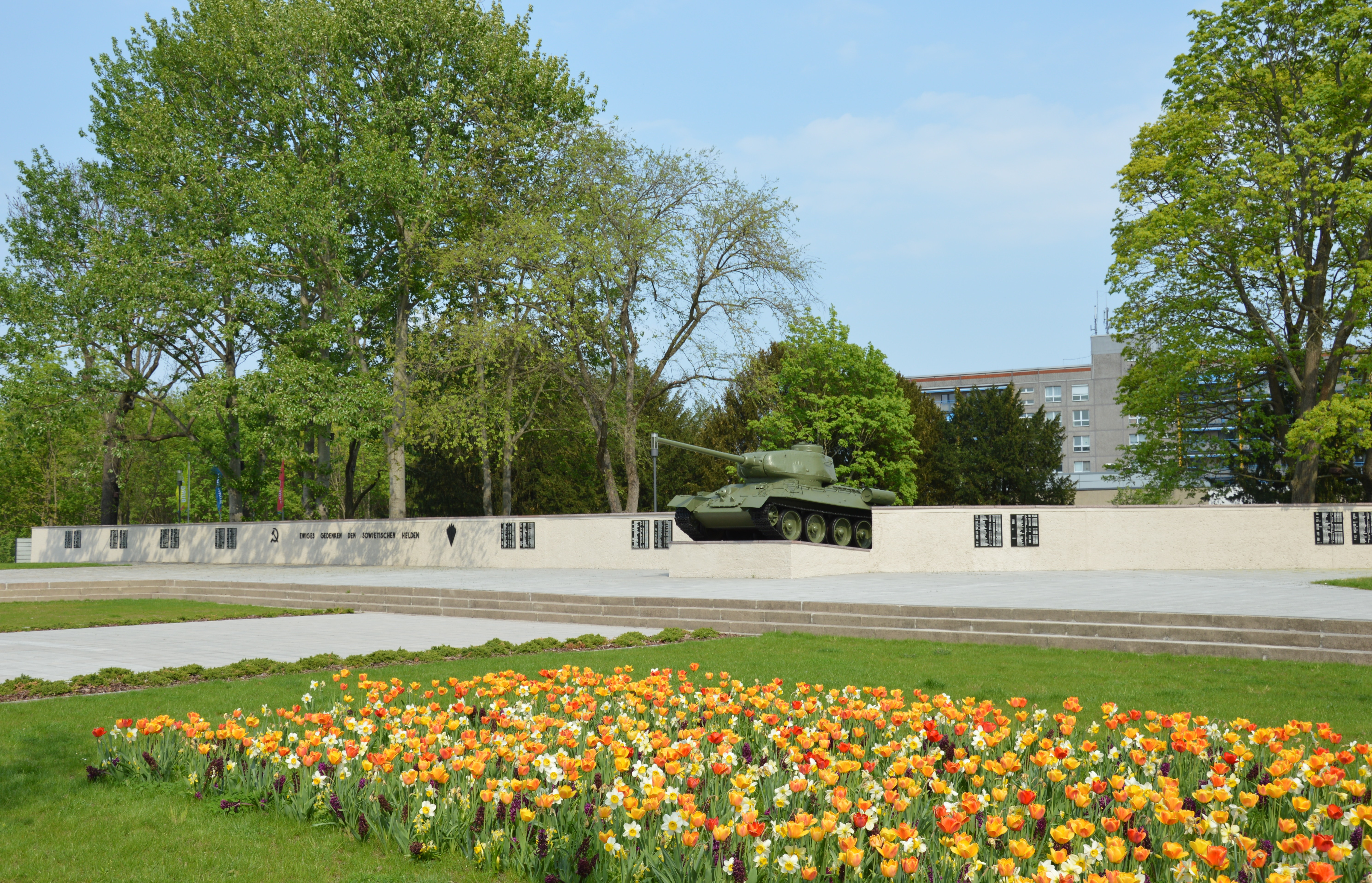 Sowjetisches Ehrenmal Burg